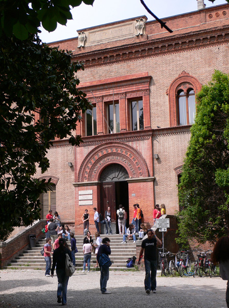 Fotografo: Riccardo TuccioCategoria:Immagini di Bologna